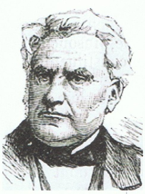 Marie de Parieu, ministre de l'Instruction publique et des cultes du 31/10/1849 au 24/01/1851, sur le site du Sénat